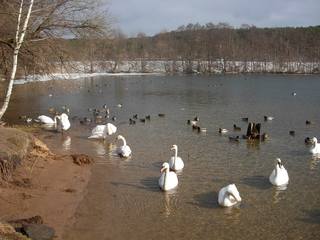 Zalew Smukalski na Brdzie w Bydgoszczy